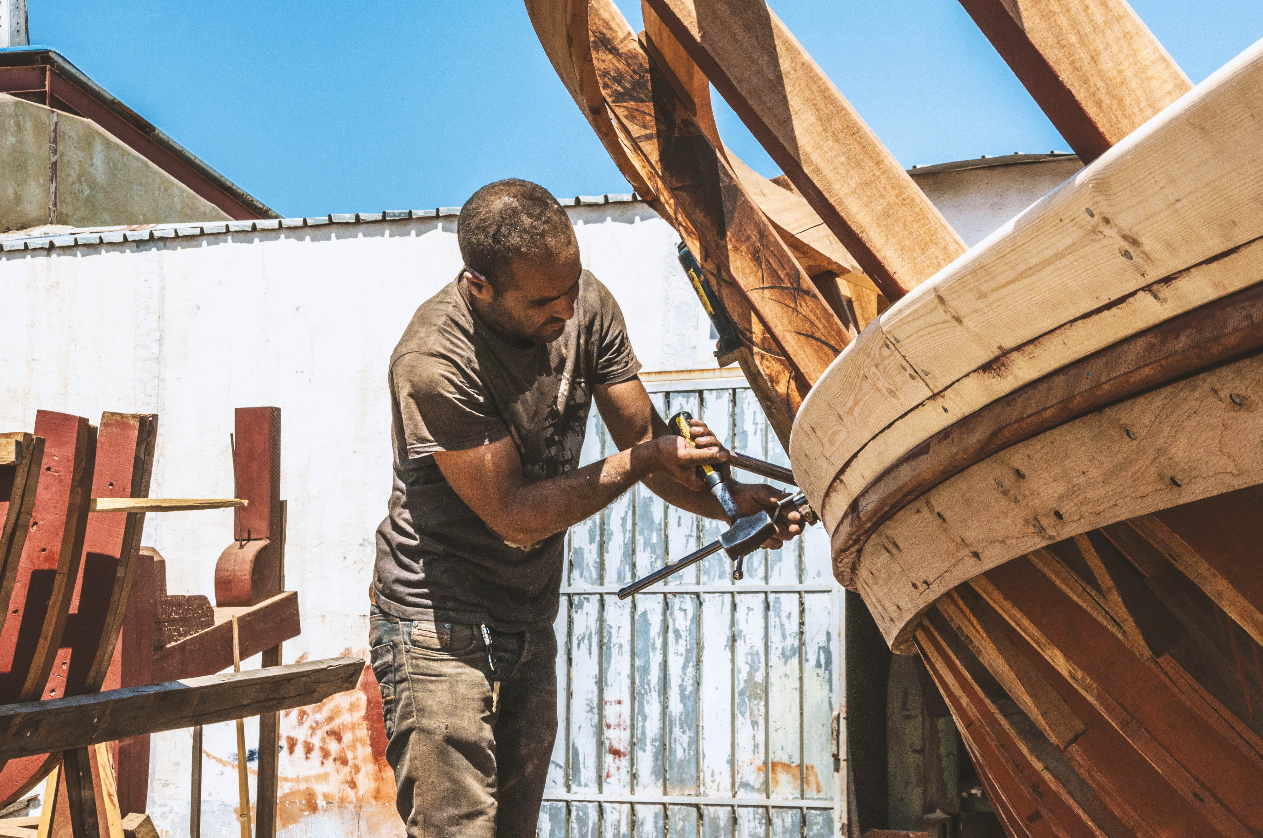 Le construction de bateau de pèche en boie est un vieux mètier au port de pèche BOUDIS a la ville de jijel en algerie This is an image of "African people at work" from Algeria